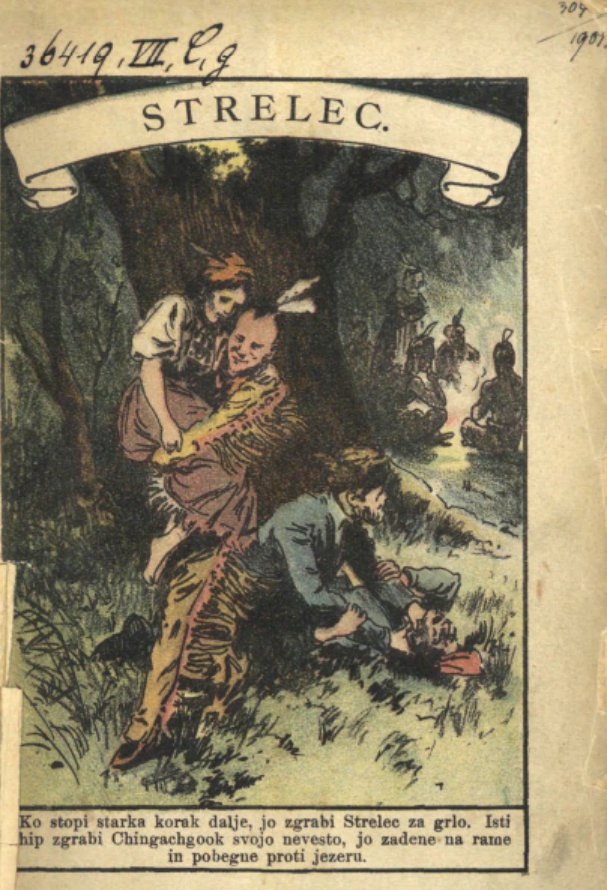 Natanael Bumppo: Strelec, 1900